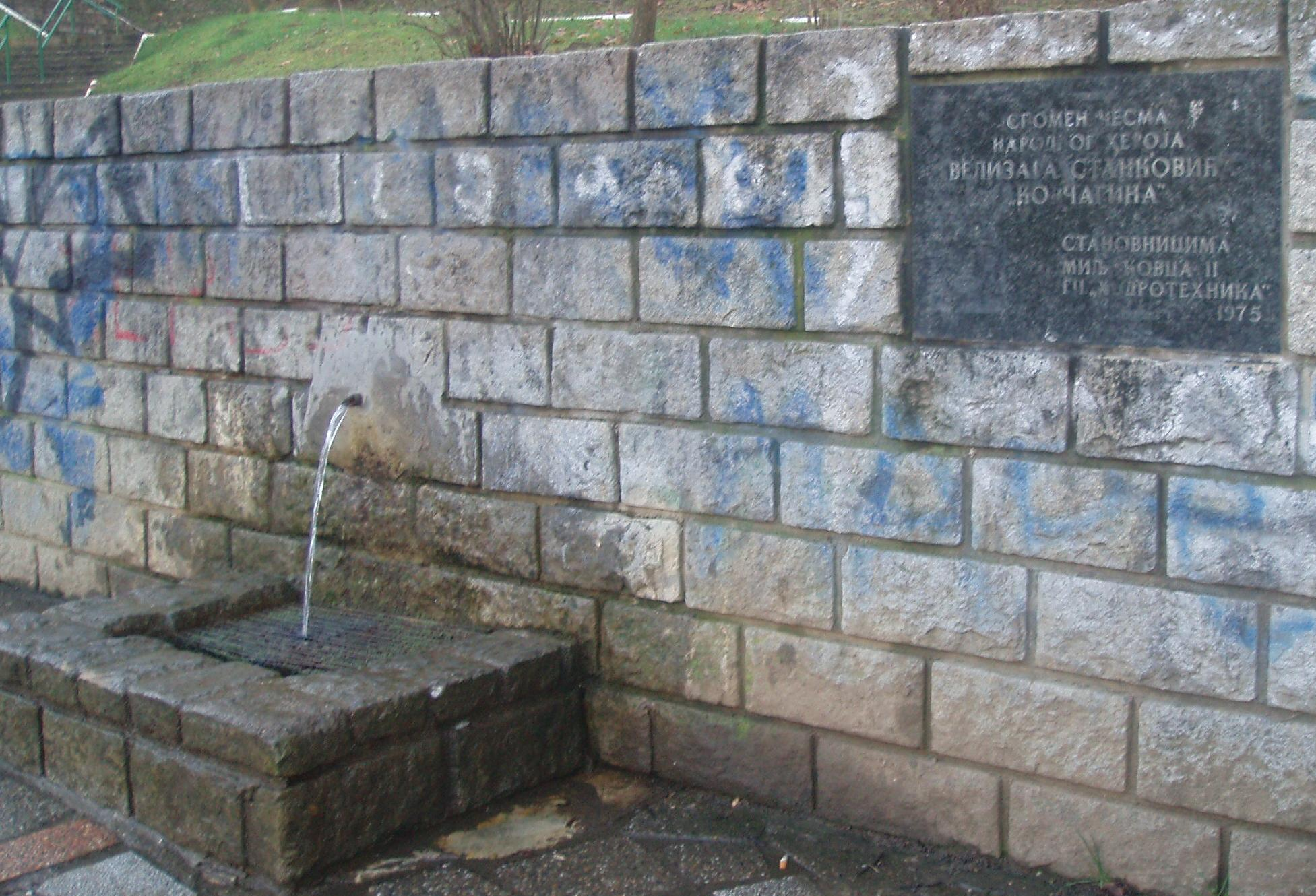 Извор из истоименог парка Миљаковца 2. Licensing